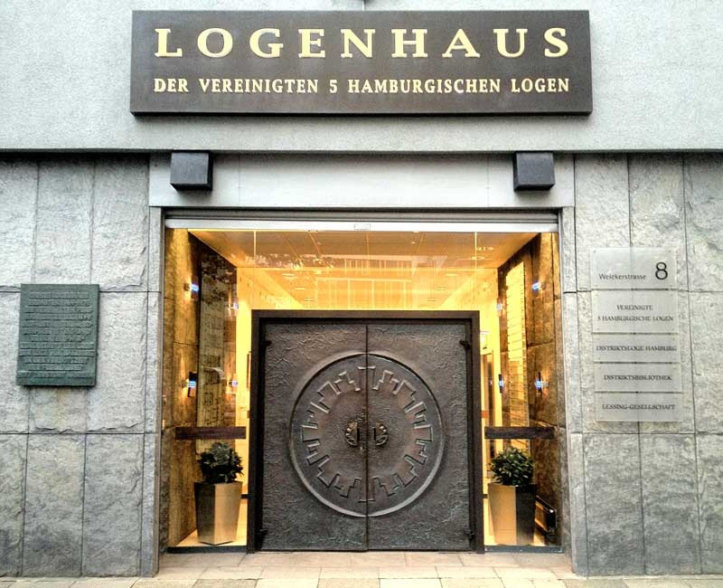 Eingang des Logenhauses Welckerstrasse 8, Hamburg